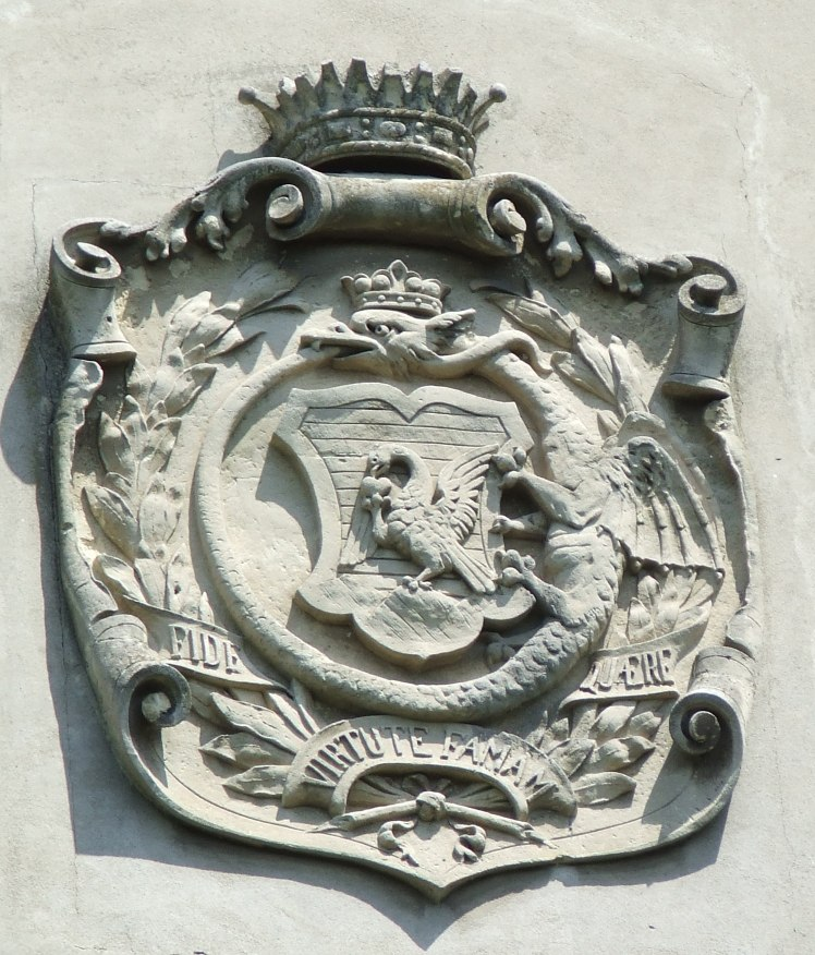 Carei Castle, Satu Mare County, Romania